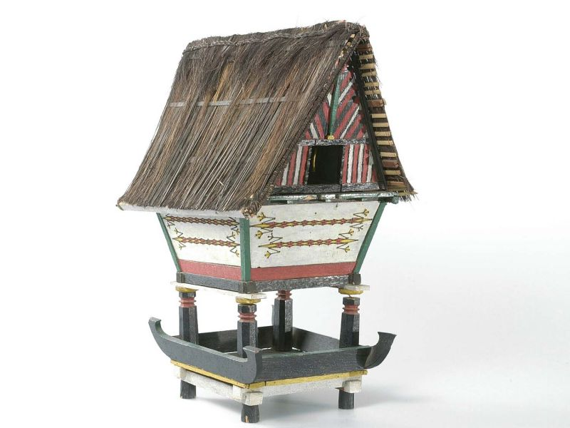 Huismodel. Model van een Batak huis met boraspati, hagedissen